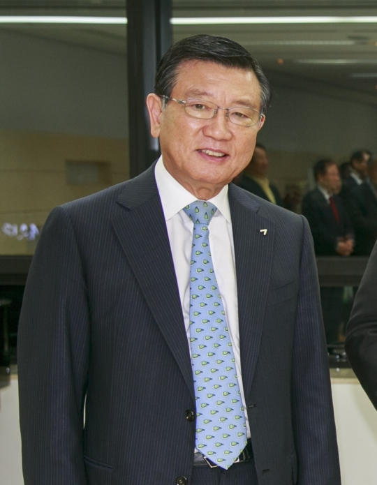 금호아시아나그룹 박삼구회장의 모습